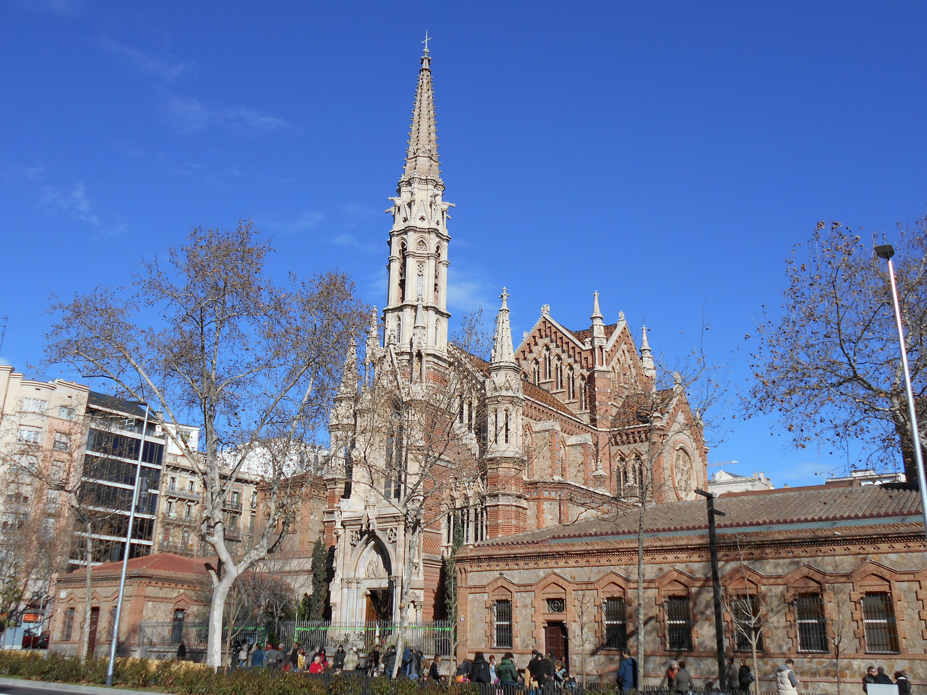 Iglesia de San Francisco de Sales de Barcelona.